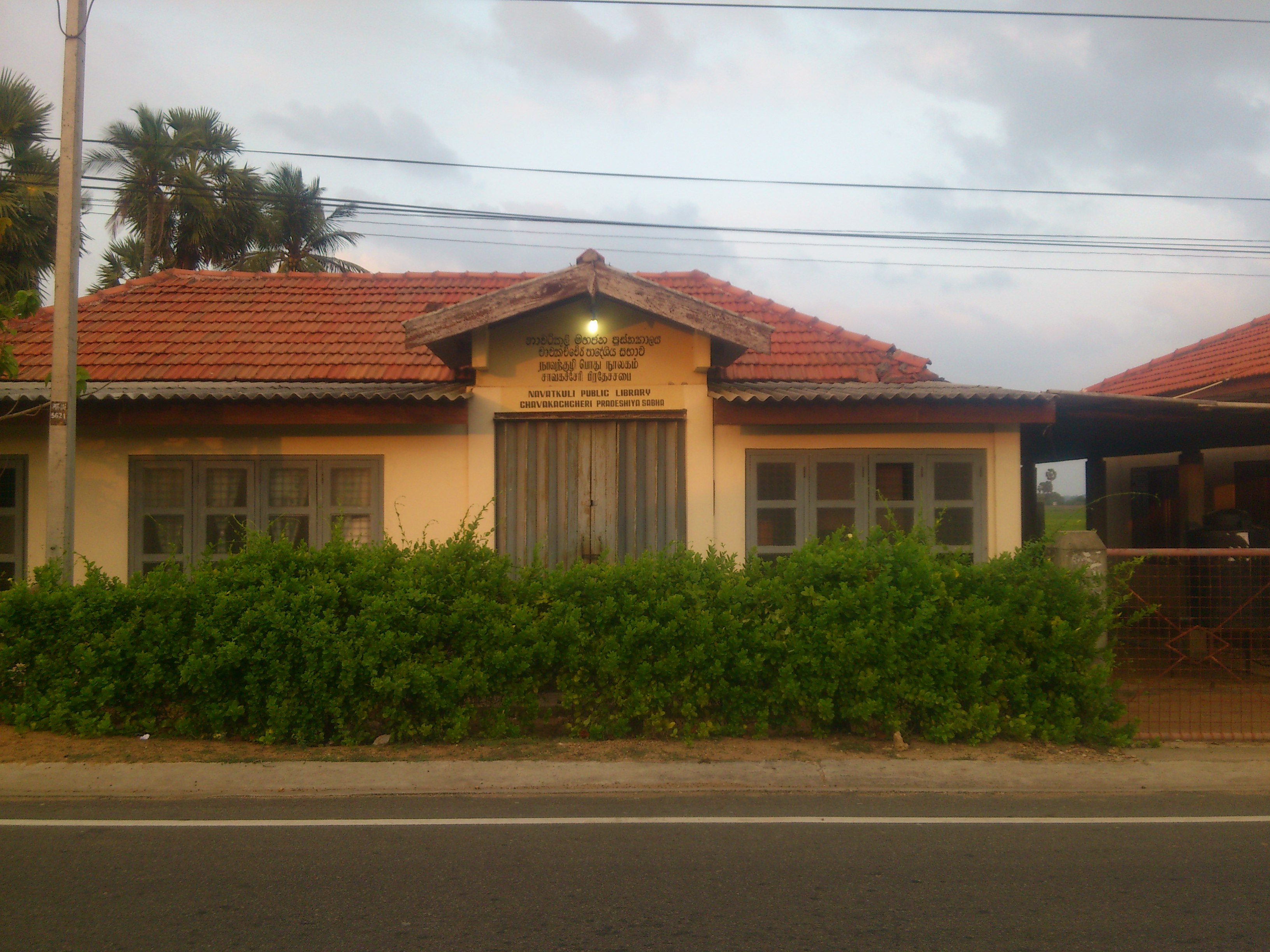 பொது நூலகம்